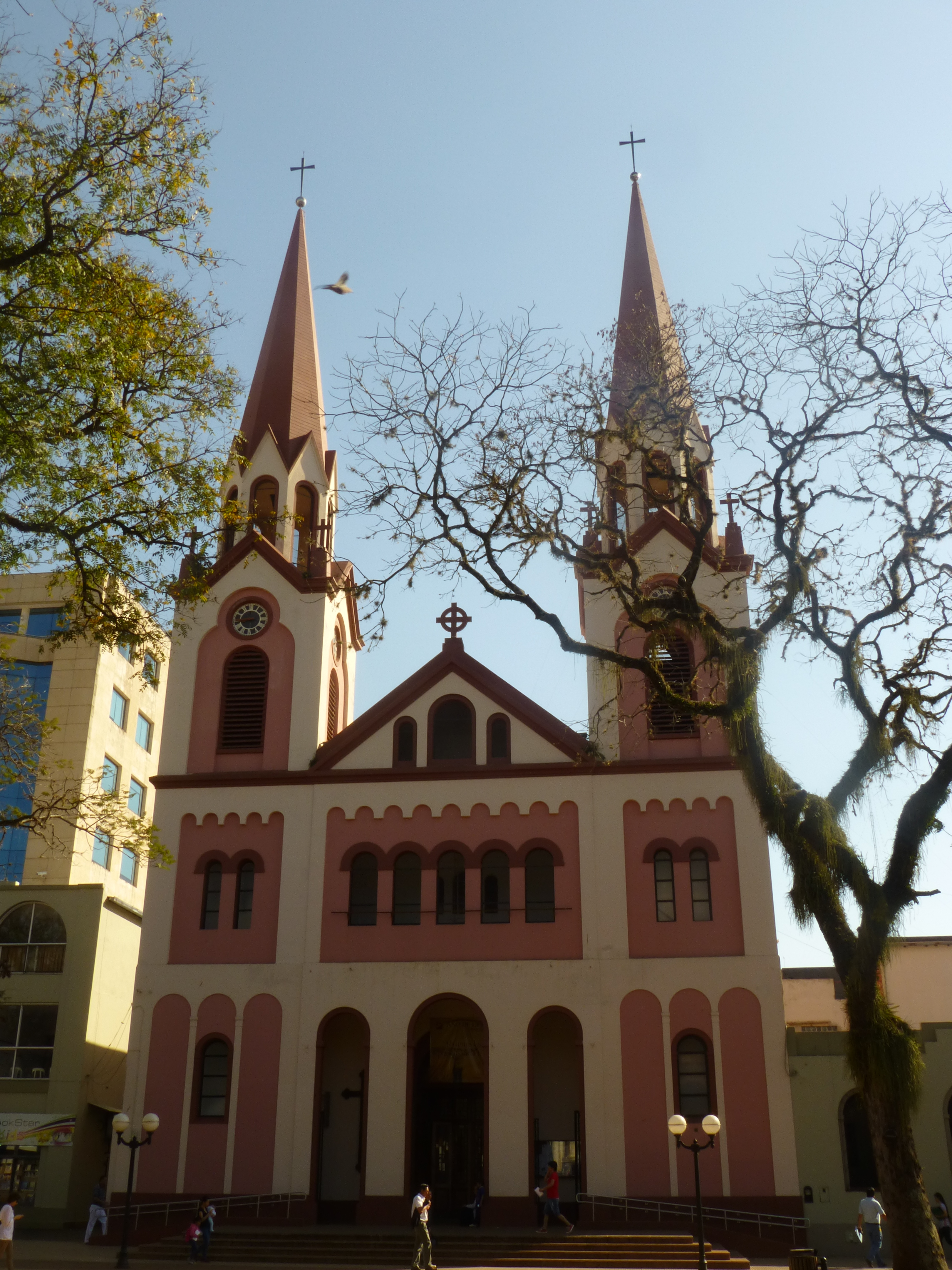 Catedral San José de Posadas, en la provincia de Misiones.